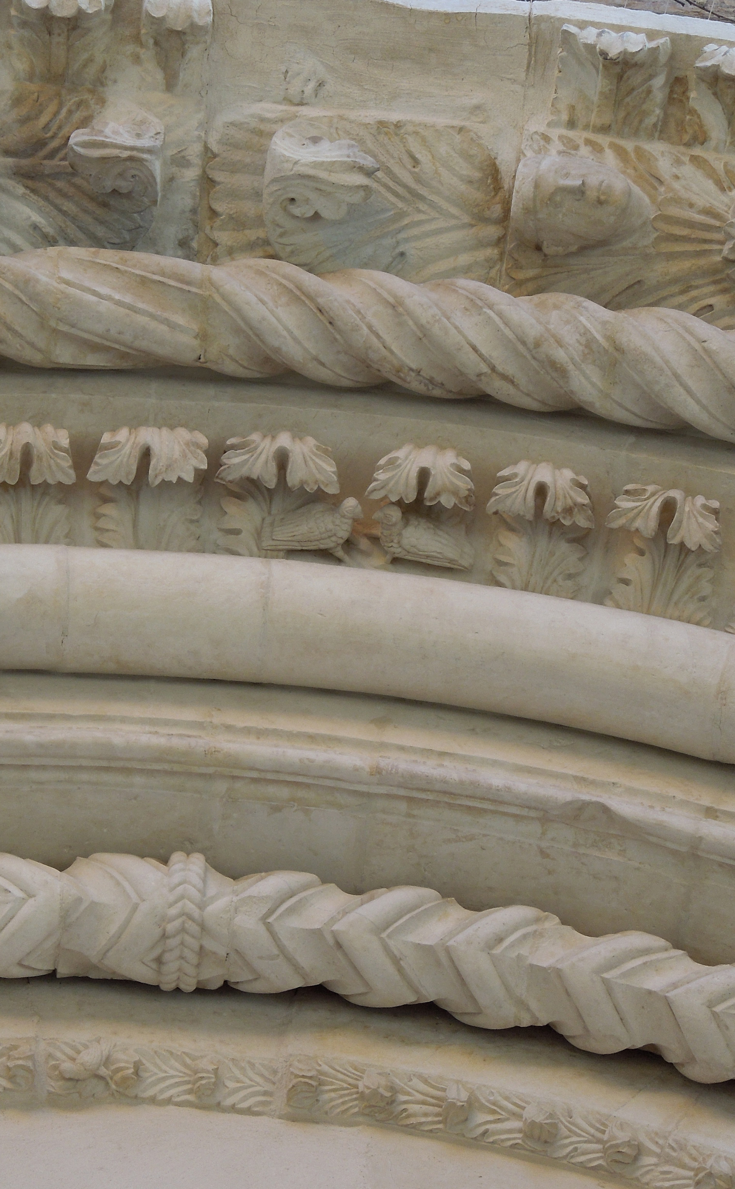 Particolare dei due volatili posti al centro e a monte della lunetta e sotto la chiave di volta del portale della chiesa di Sant'Antonio di Teramo, in Abruzzo.